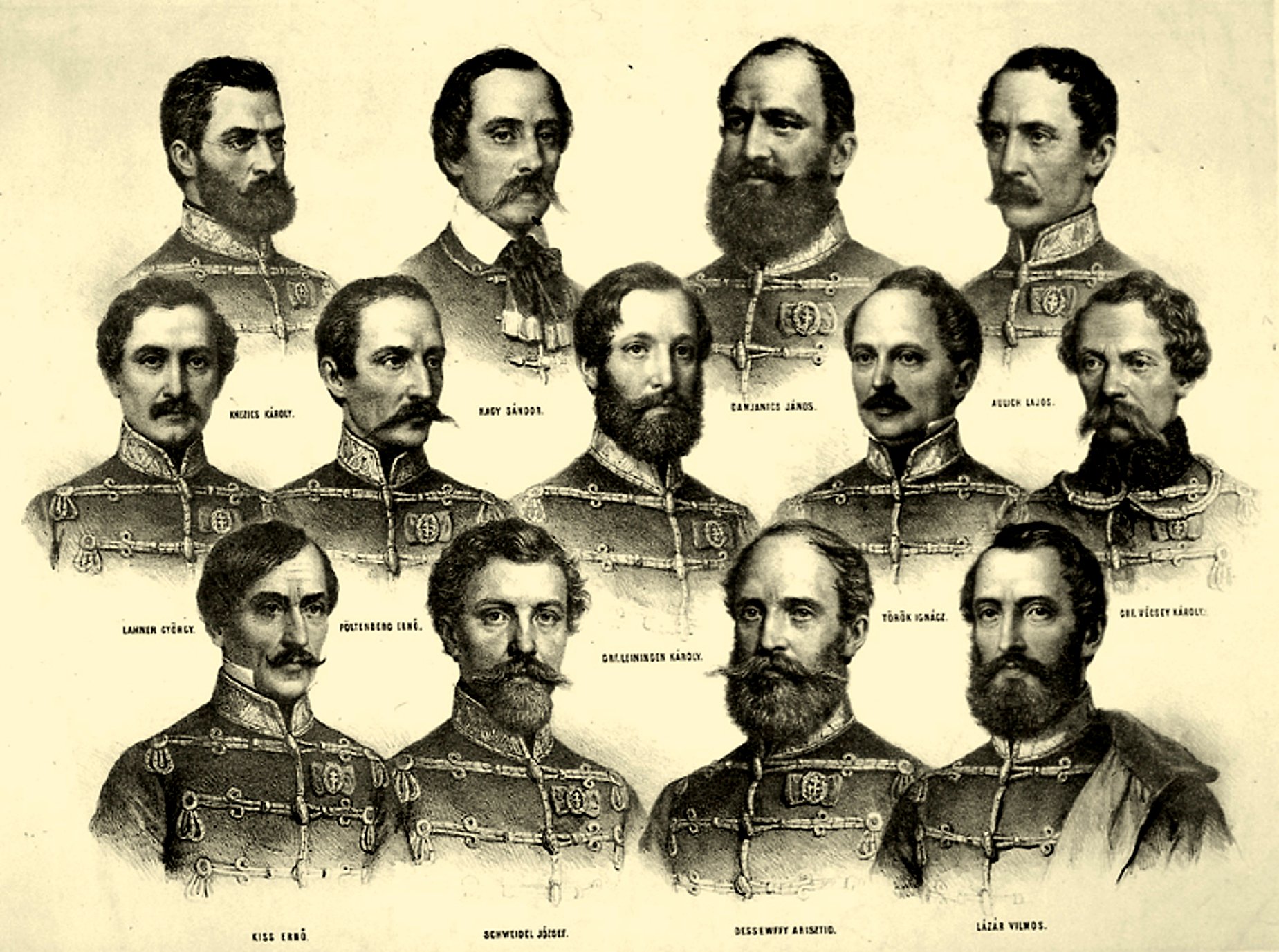 Az aradi 13 vértanú